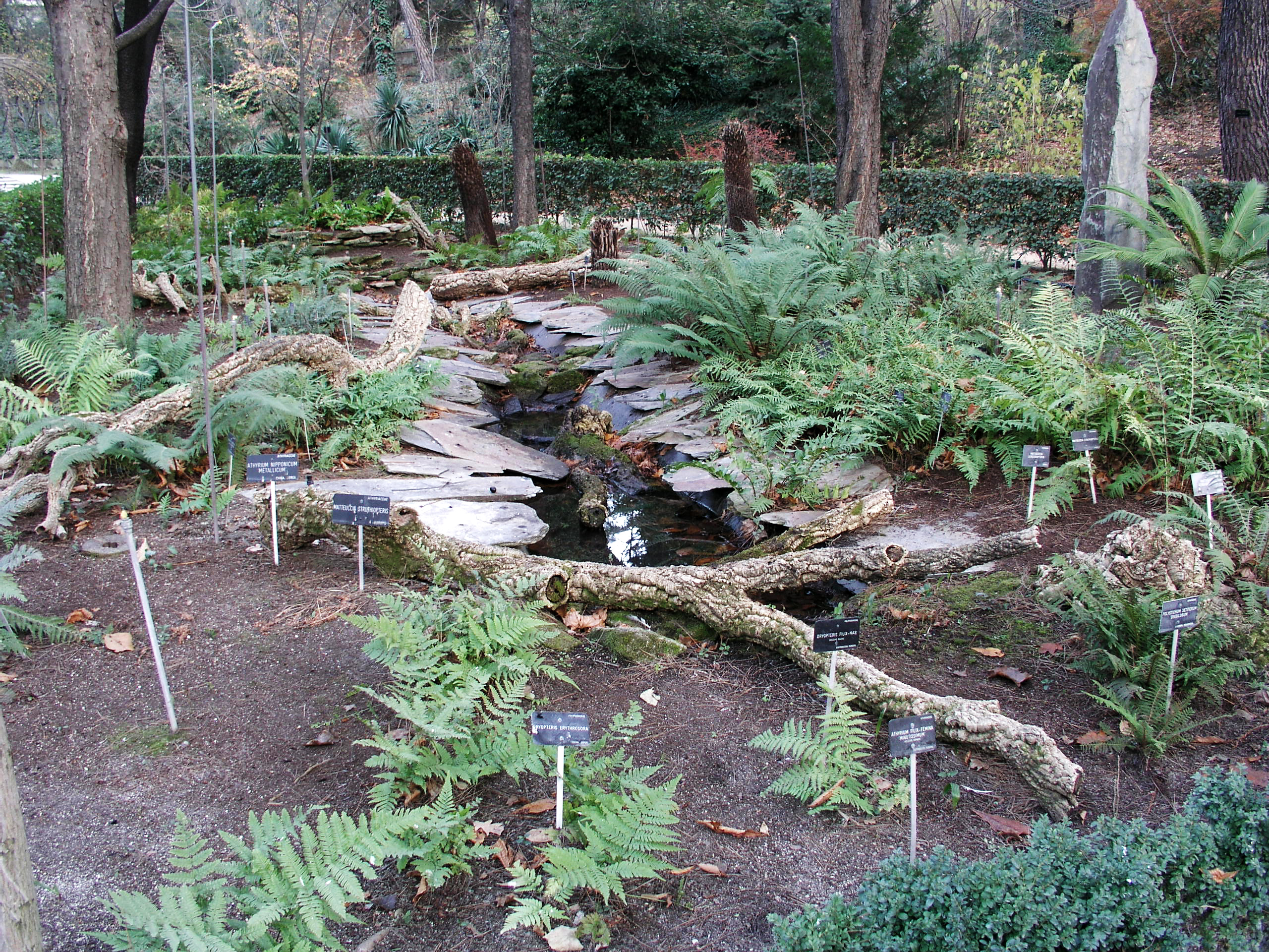 Royal Garden Botanico, Madrid, Spain. Pteridofitos and Cicadales.